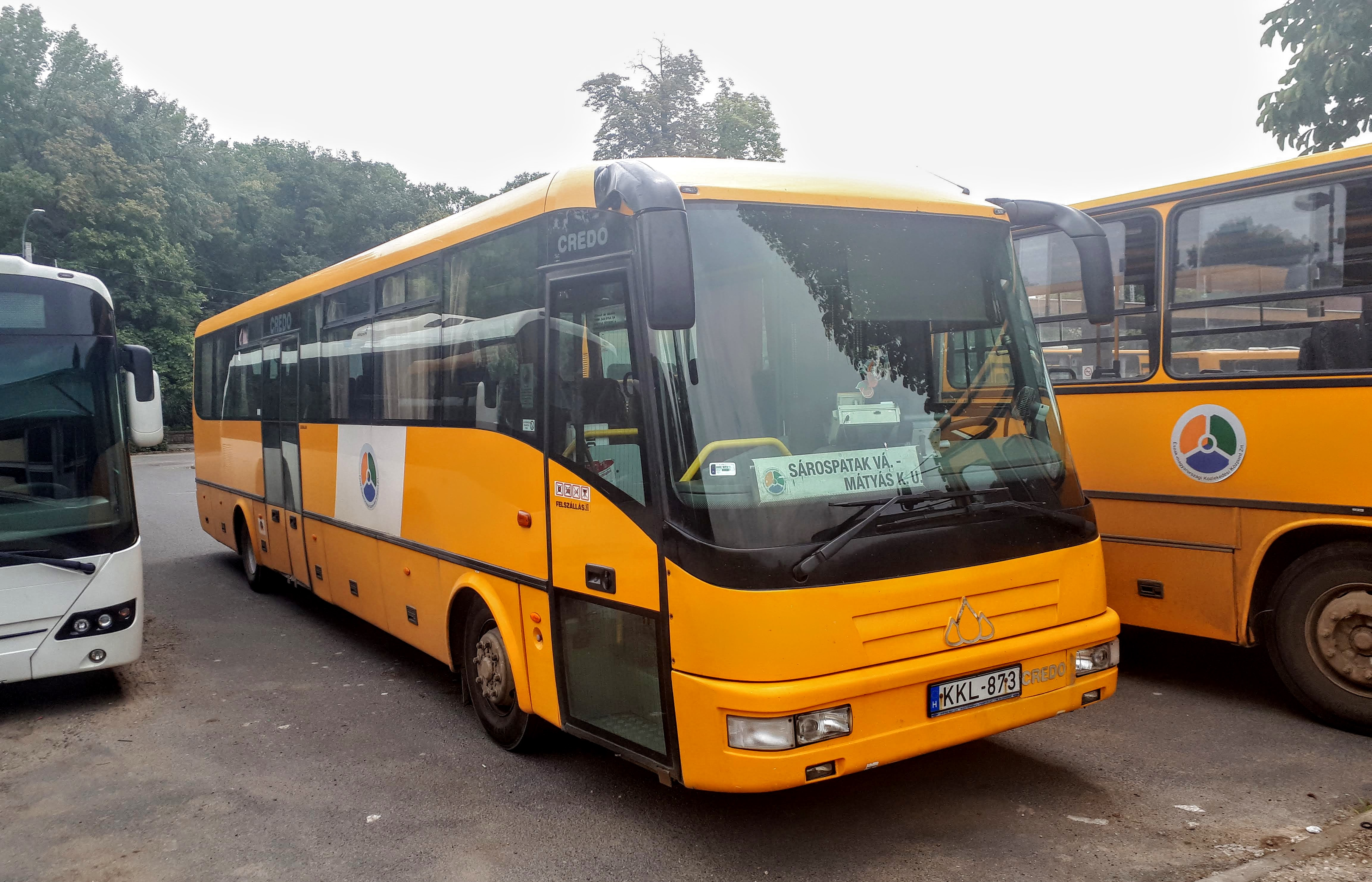 Az ÉMKK KKL-873 rendszámú Credo EC 12 típusú busza Sárospatakon, a 3885-ös helyközi járaton.